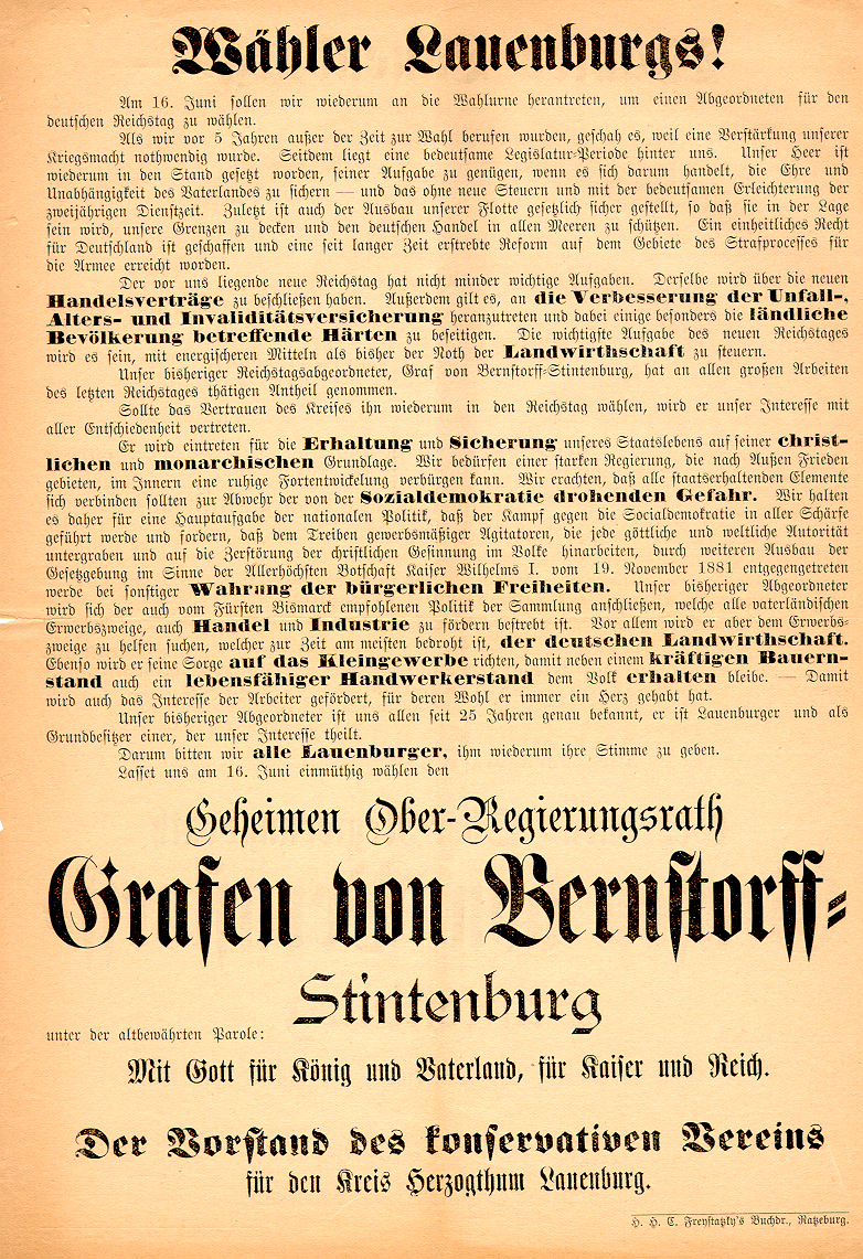 Reichstagswahl 1903 in Lauenburg